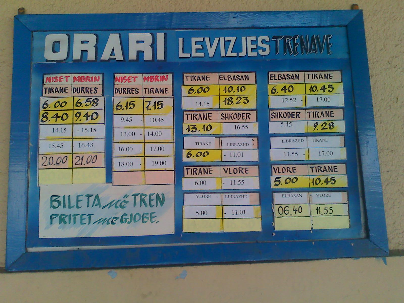 Fahrplantafel der Albanischen Eisenbahn am Bahnhof Tirana, Stand Mai 2012